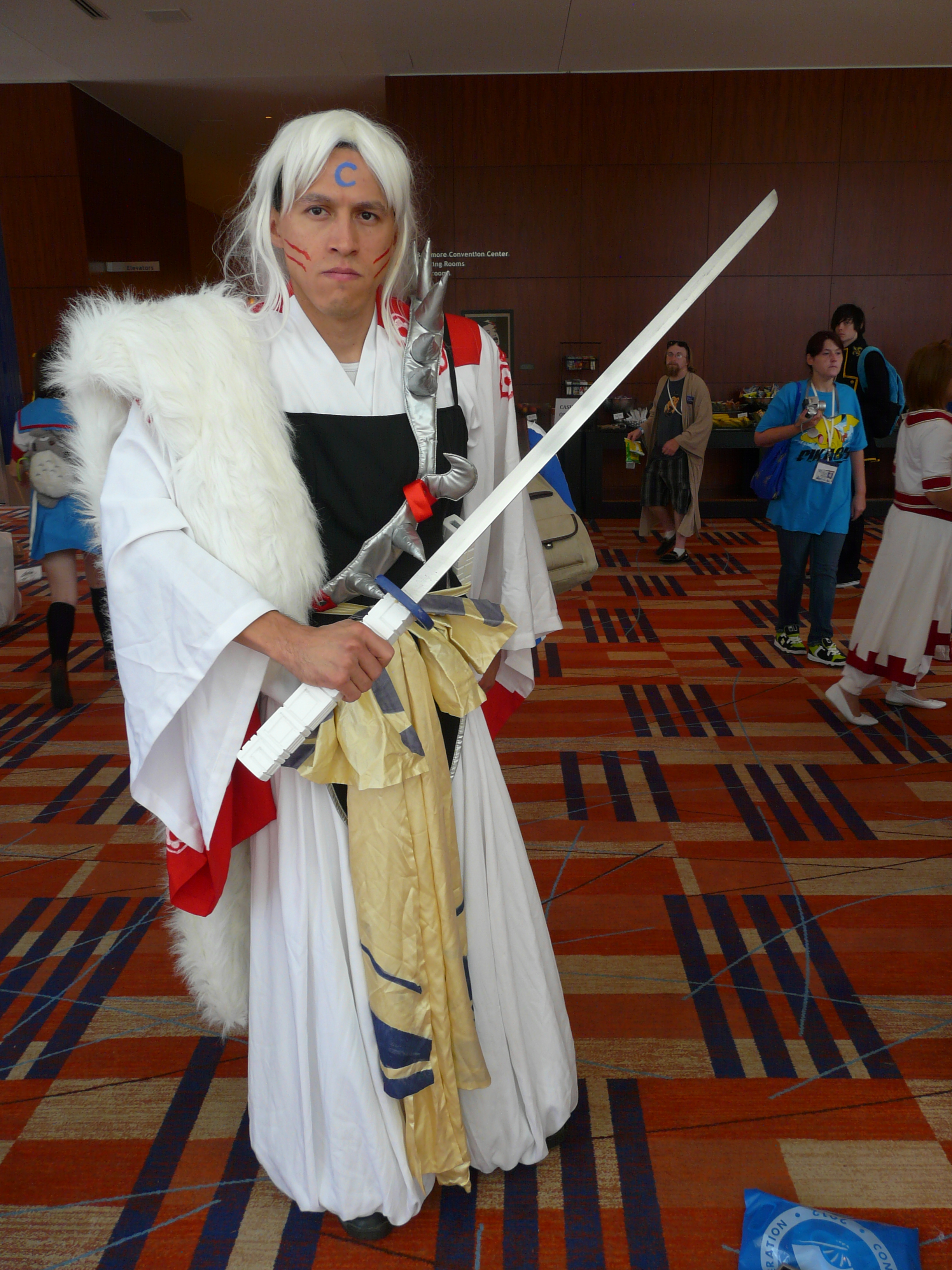 Otakon 2012 cosplay